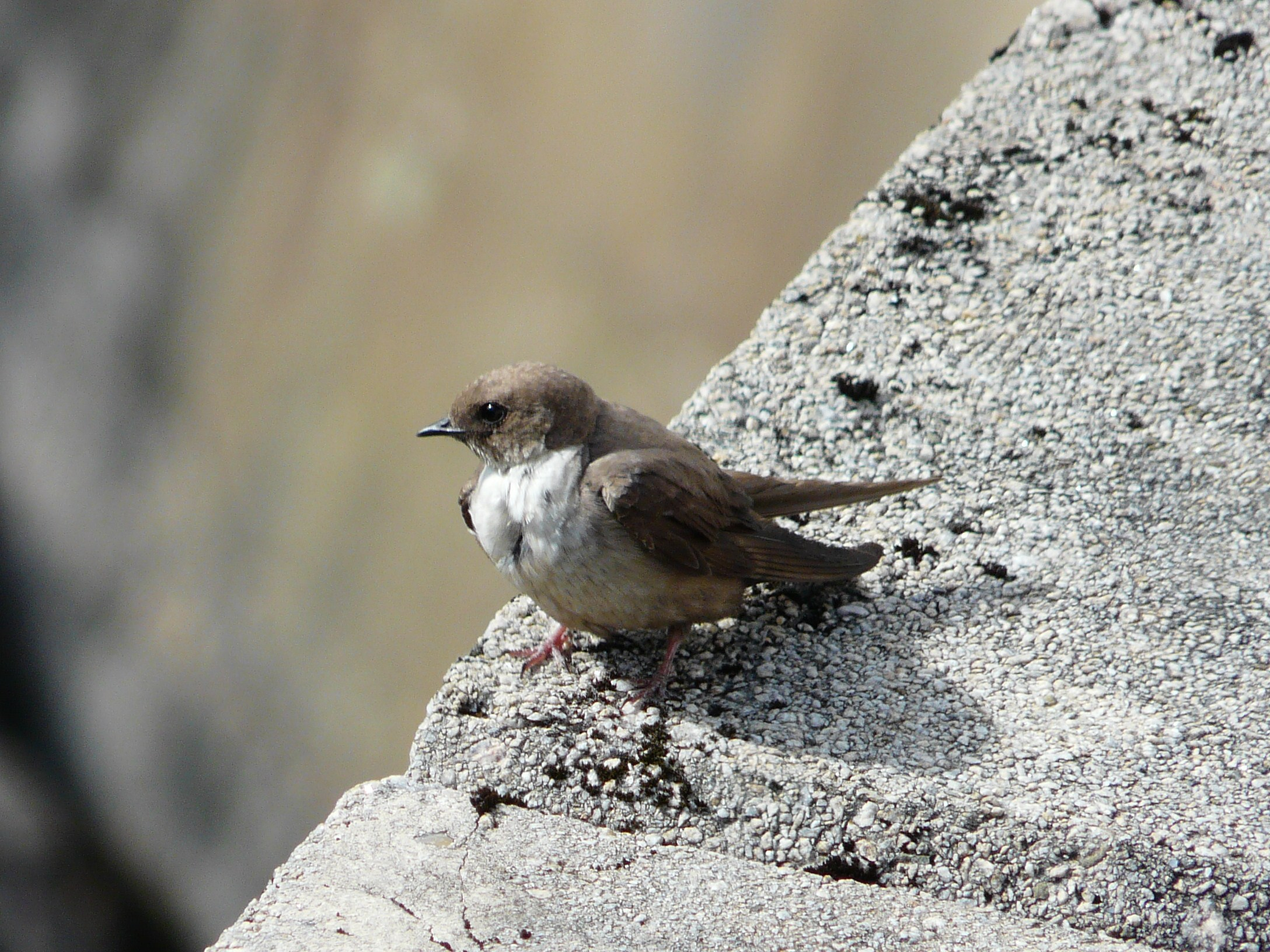 Hirondelle de rochers (Ptyonoprogne rupestris) au barrage d'Enchanet, Cantal, France.